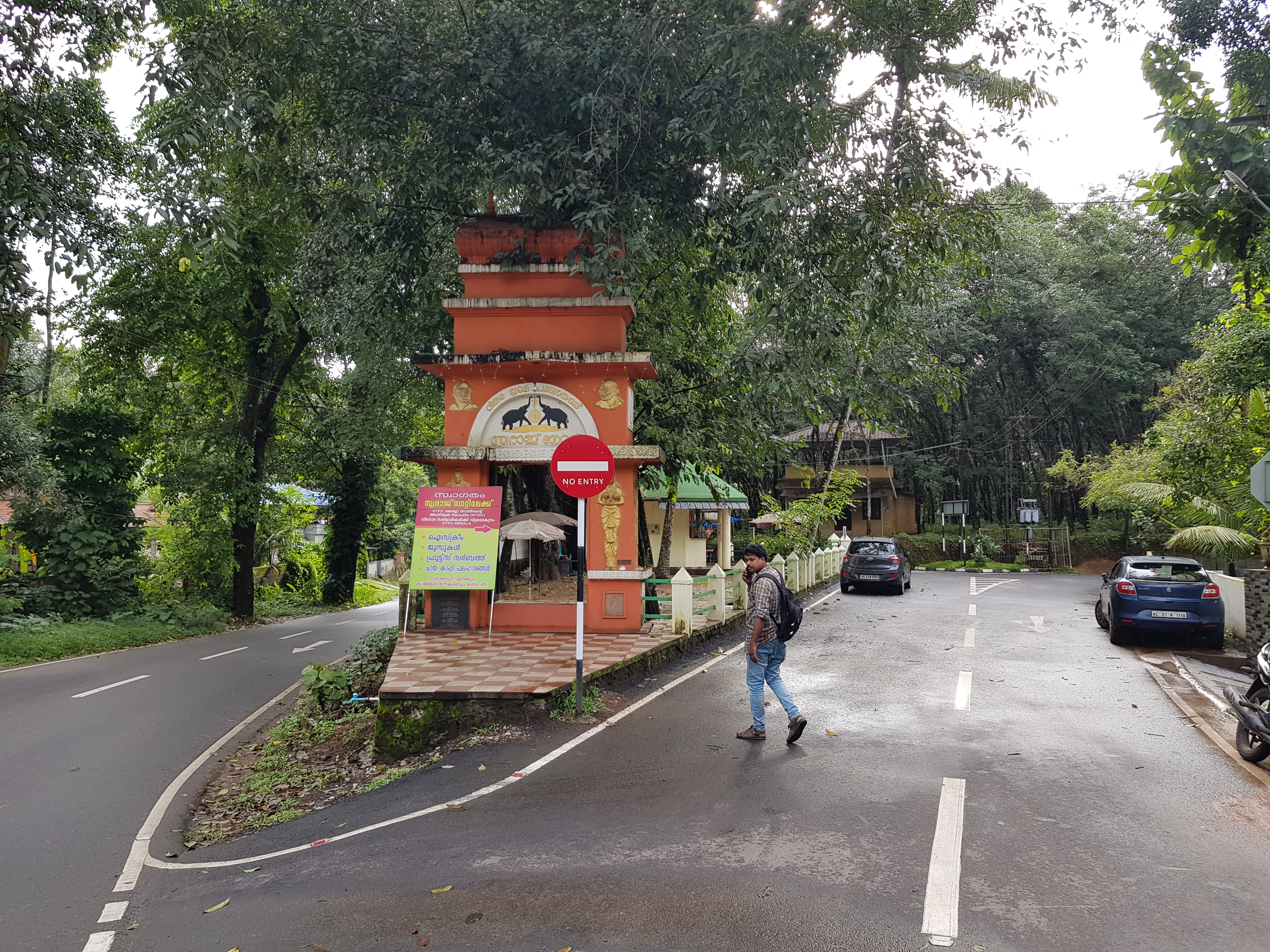 സ്വരാജ് ഗേറ്റ്